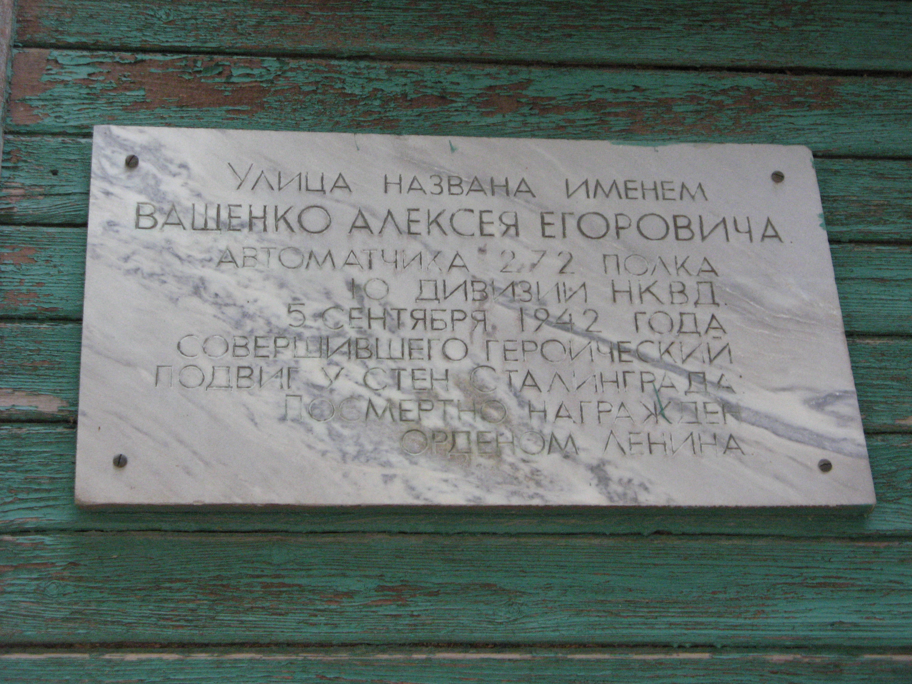 Мемориальная доска на улице Ващенко в Волгограде, названной в честь Ващенко Алексея Егоровича